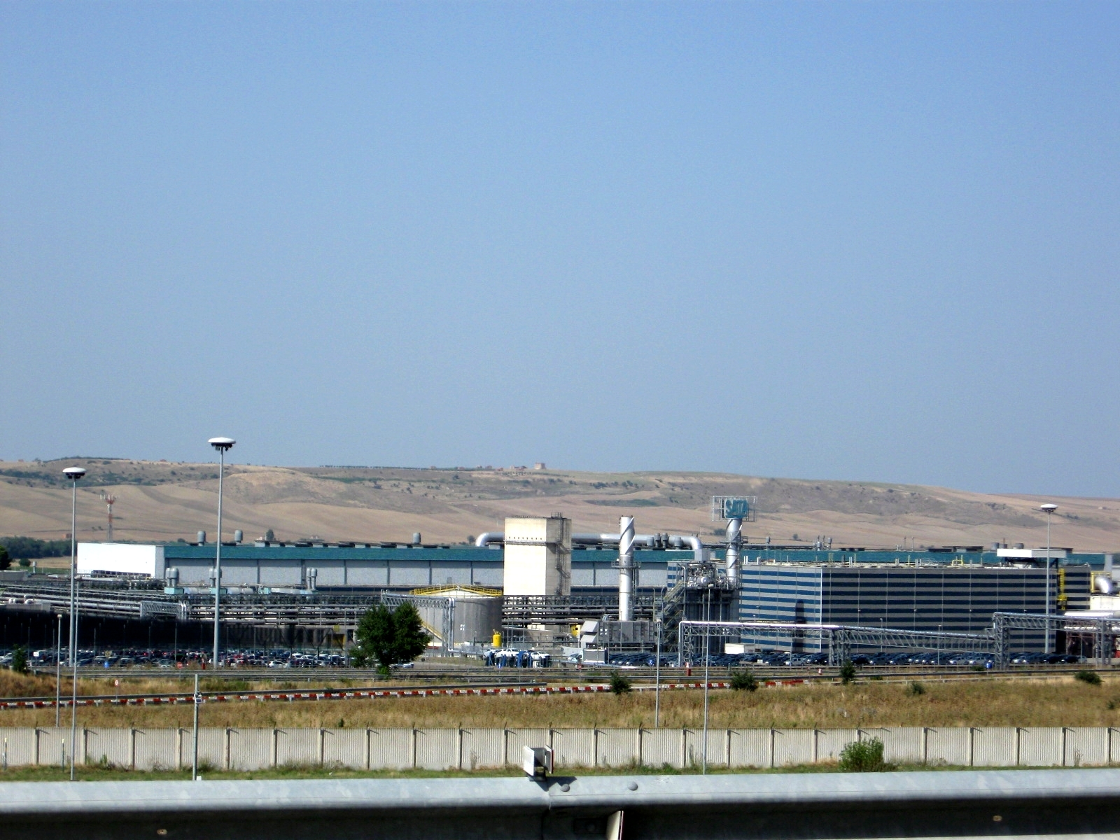 Vista di una parte dello stabilimento SATA di Melfi